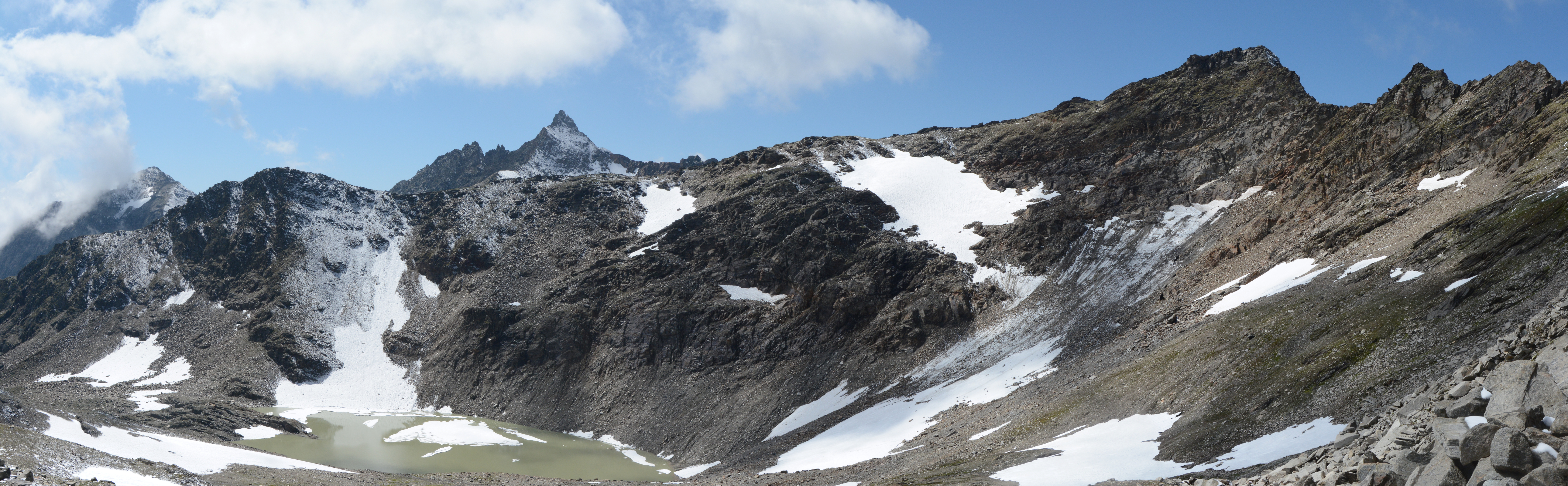 Das Wildenkees in der Venedigergruppe.